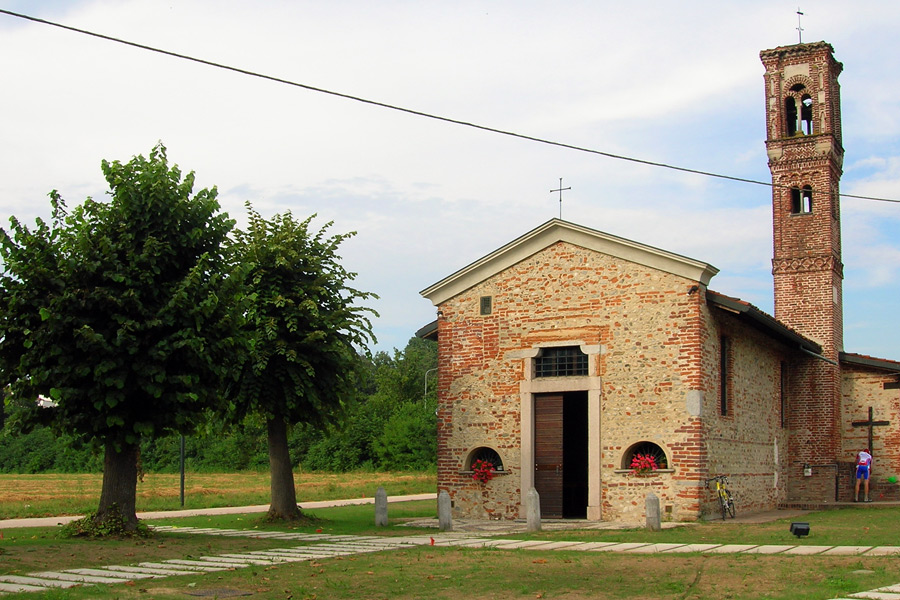 Chiesetta di Santa Maria in Binda (XIII secolo) a Nosate (MI)